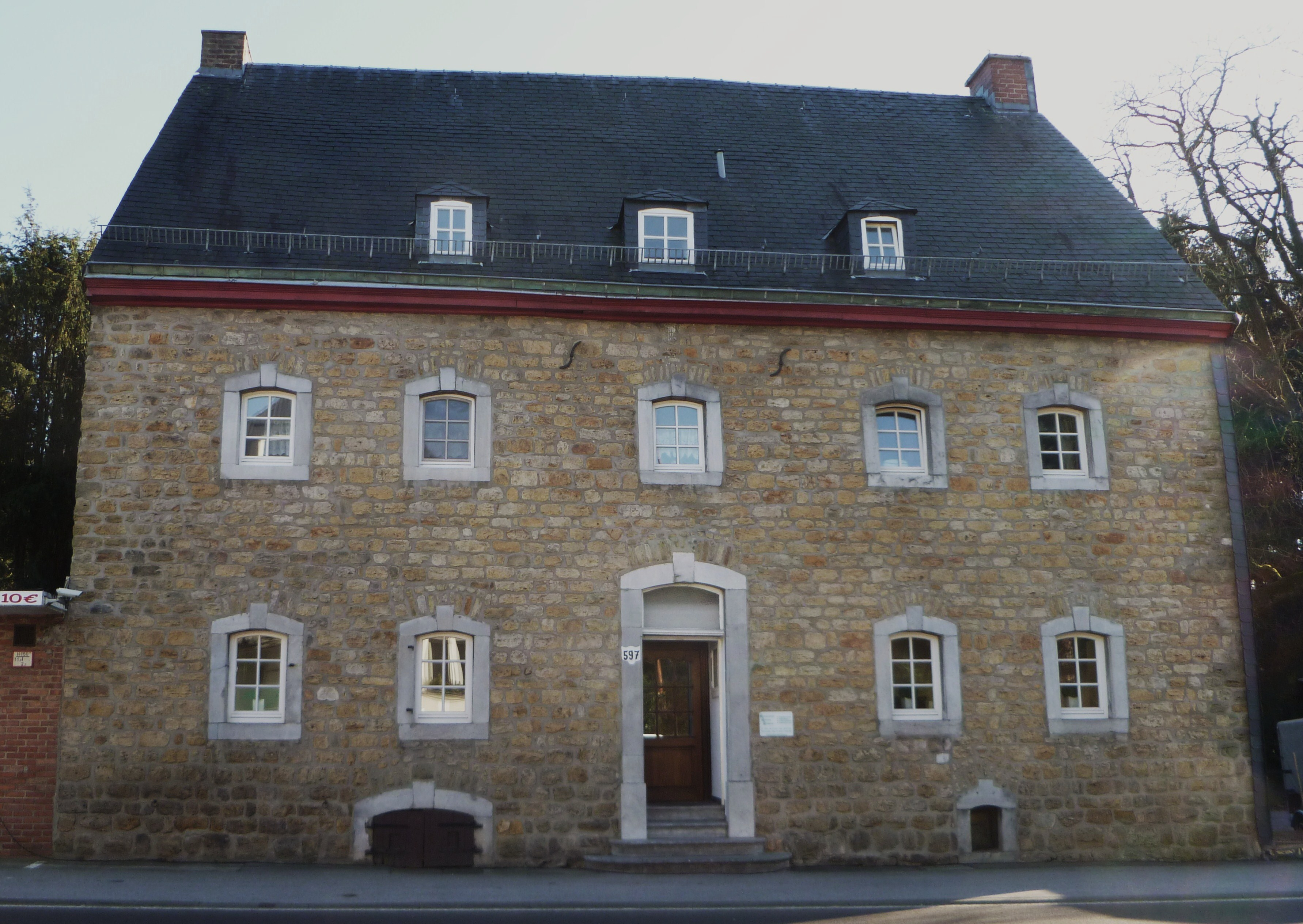 Baudenkmal in Aachen-Mitte